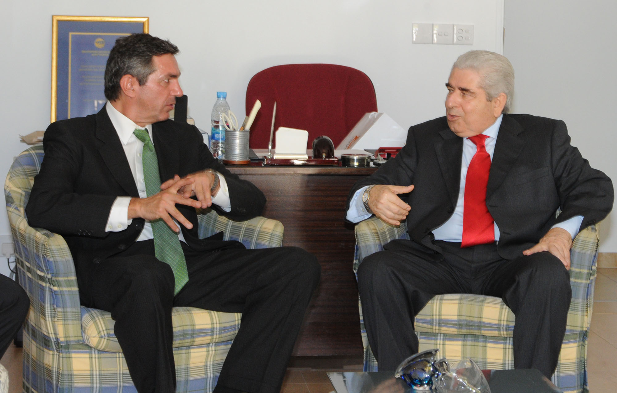 Επίσκεψη Υπουργού Εξωτερικών Σταύρου Λαμπρινίδη στην Κύπρο (18.06.2011)